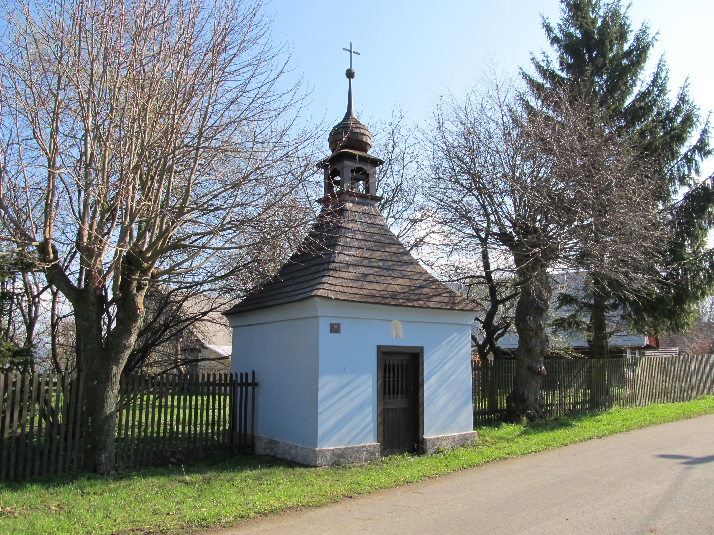 Štítov - kaplička